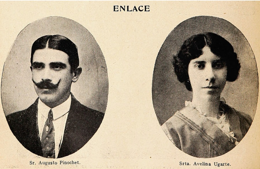 Noticia del Enlace entre el Sr. Augusto Pinochet y la Srta. Avelina Ugarte, padres de Augusto Pinochet Ugarte.